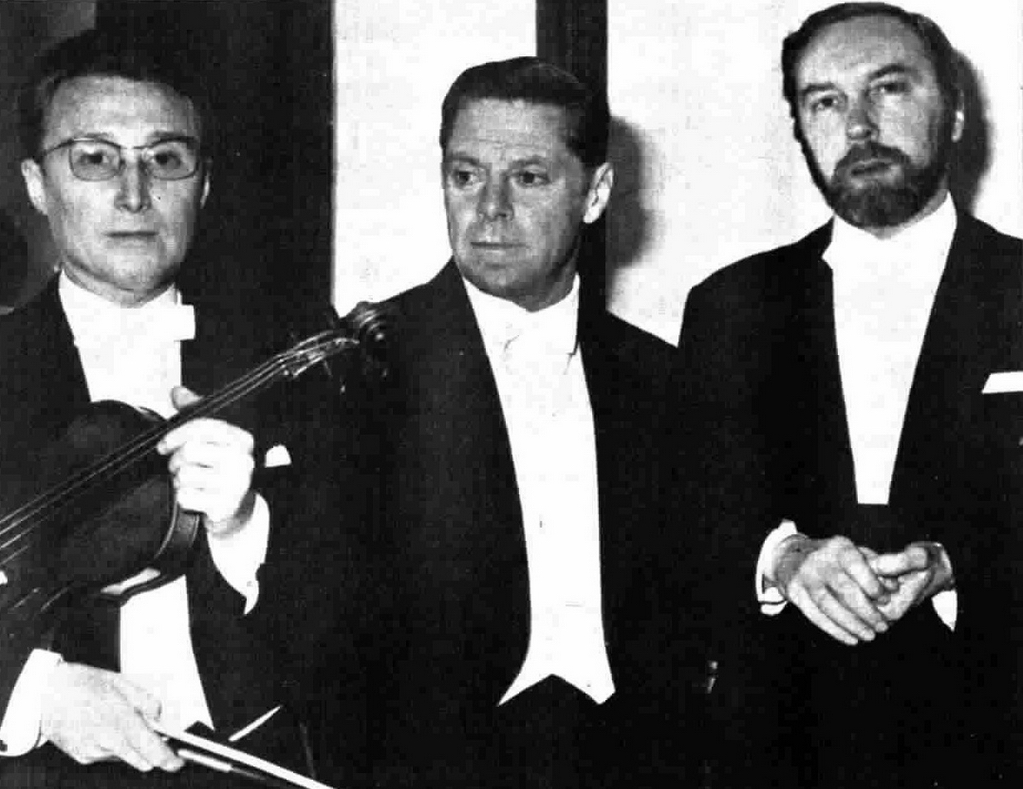 Italian classical ensamble Trio di Trieste